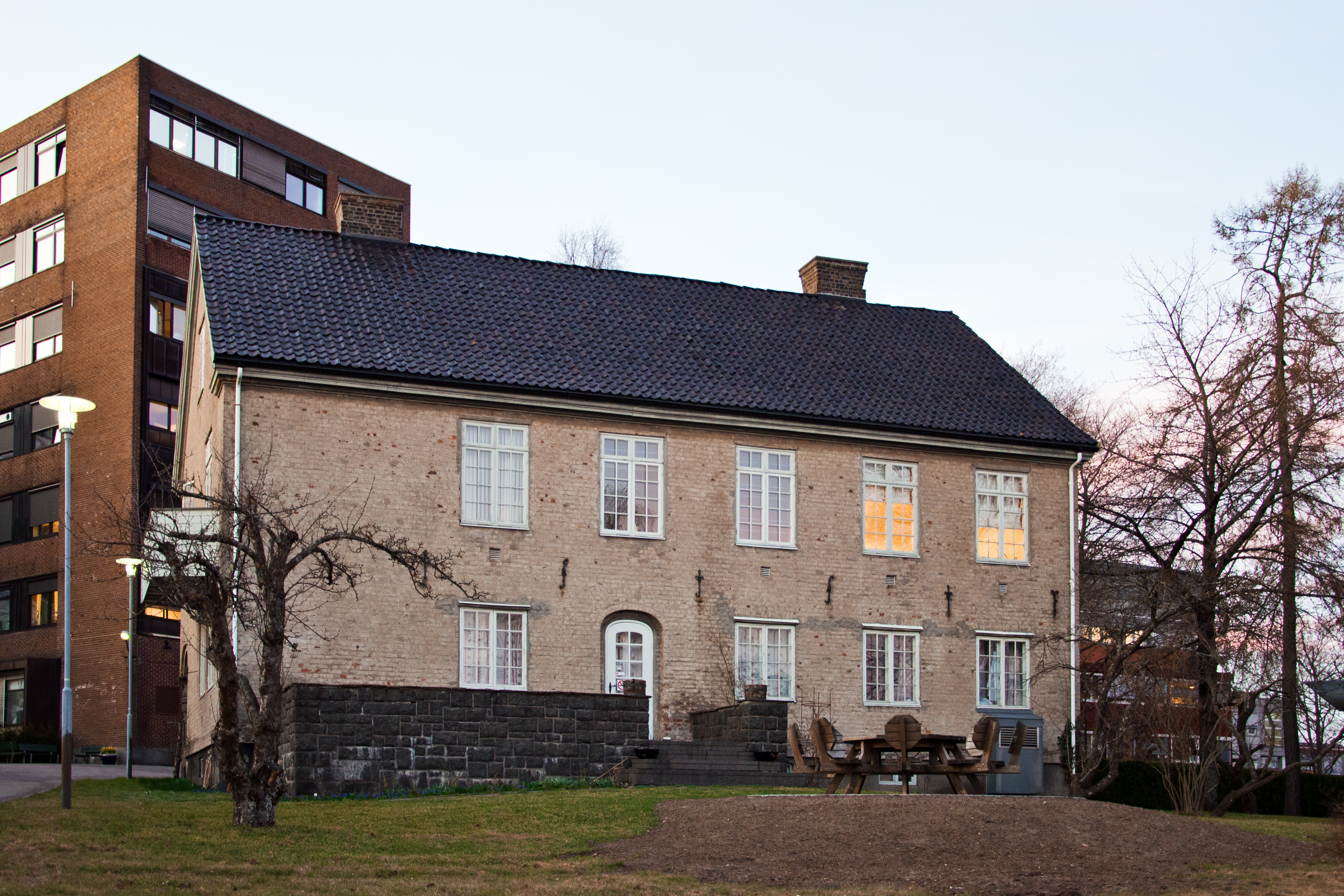 Overlegebolig oppført 1922 ved Tønsberg sykehus. Nå: Sykehuset i Vestfold, bygg N